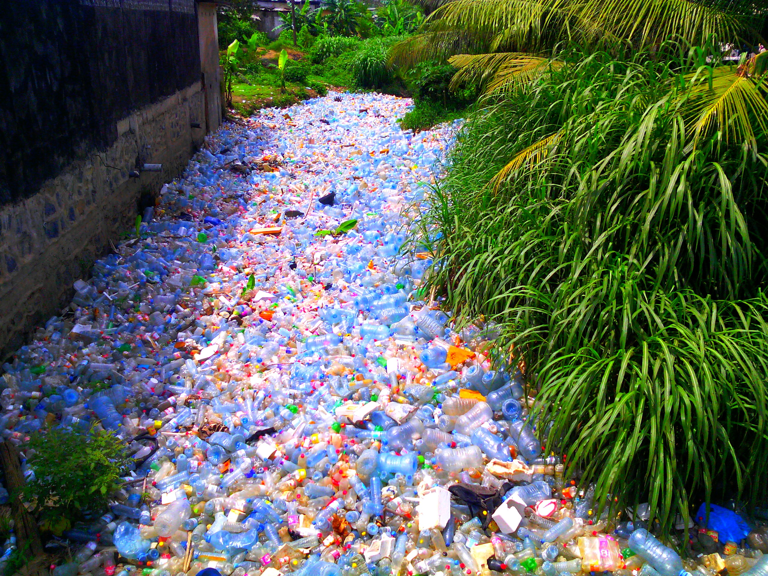 Cette image représente un cours d'eau au quartier Madagascar à Douala avalée par la pollution plastique.